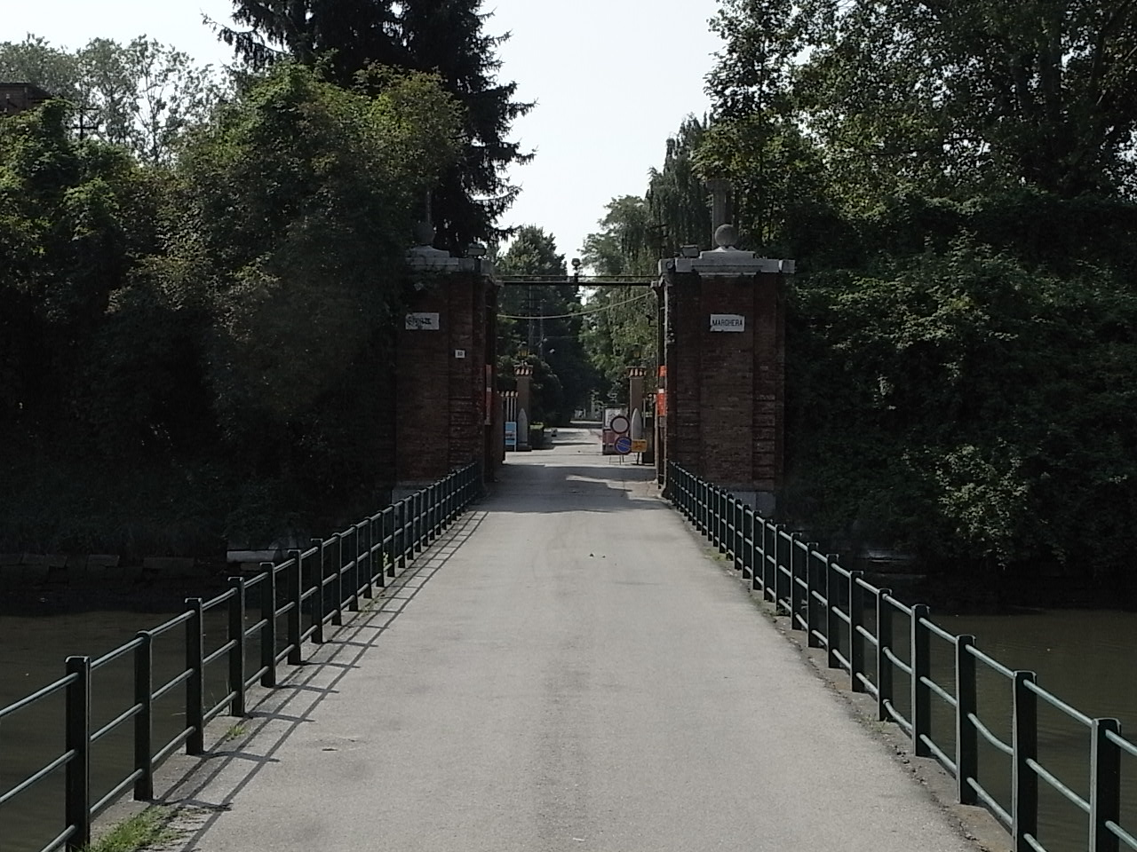 Festung Forte Marghera in Mestre (Venedig), Eingang